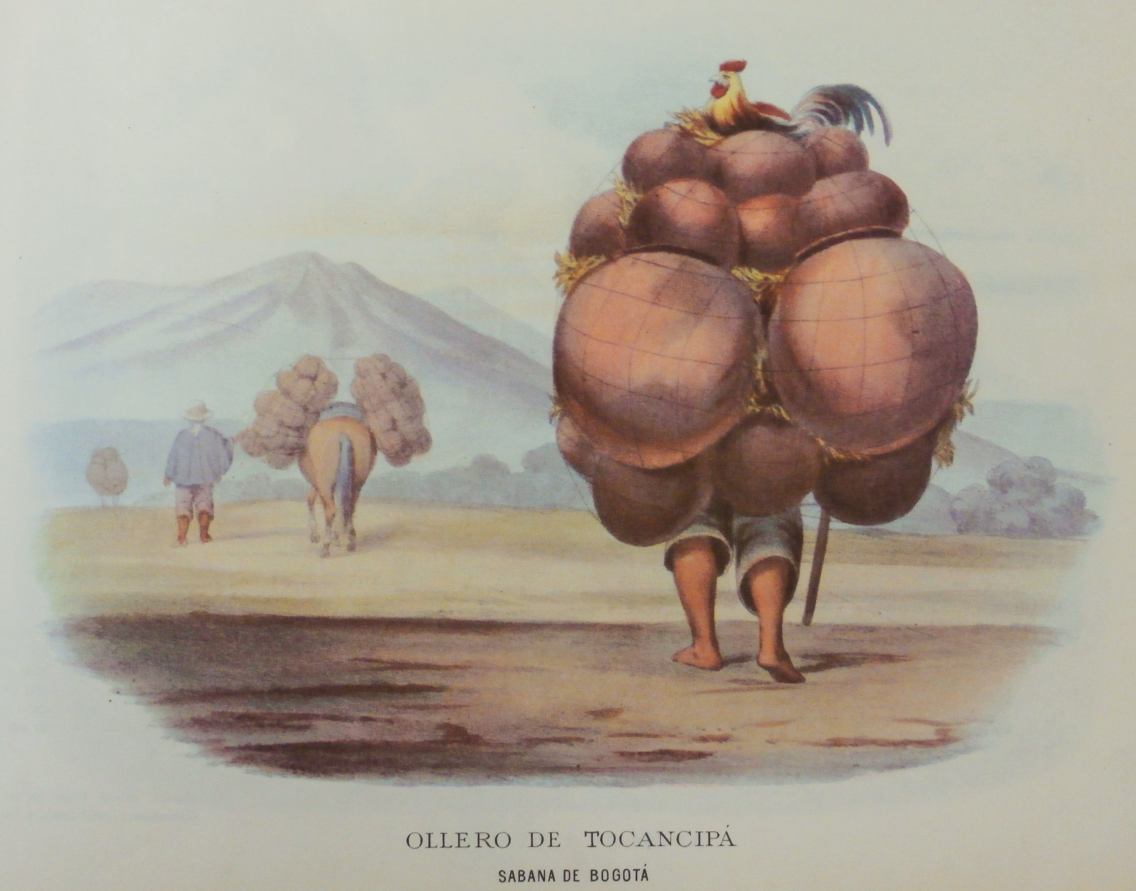 Litografía del artista colombiano Ramón Torres Méndez